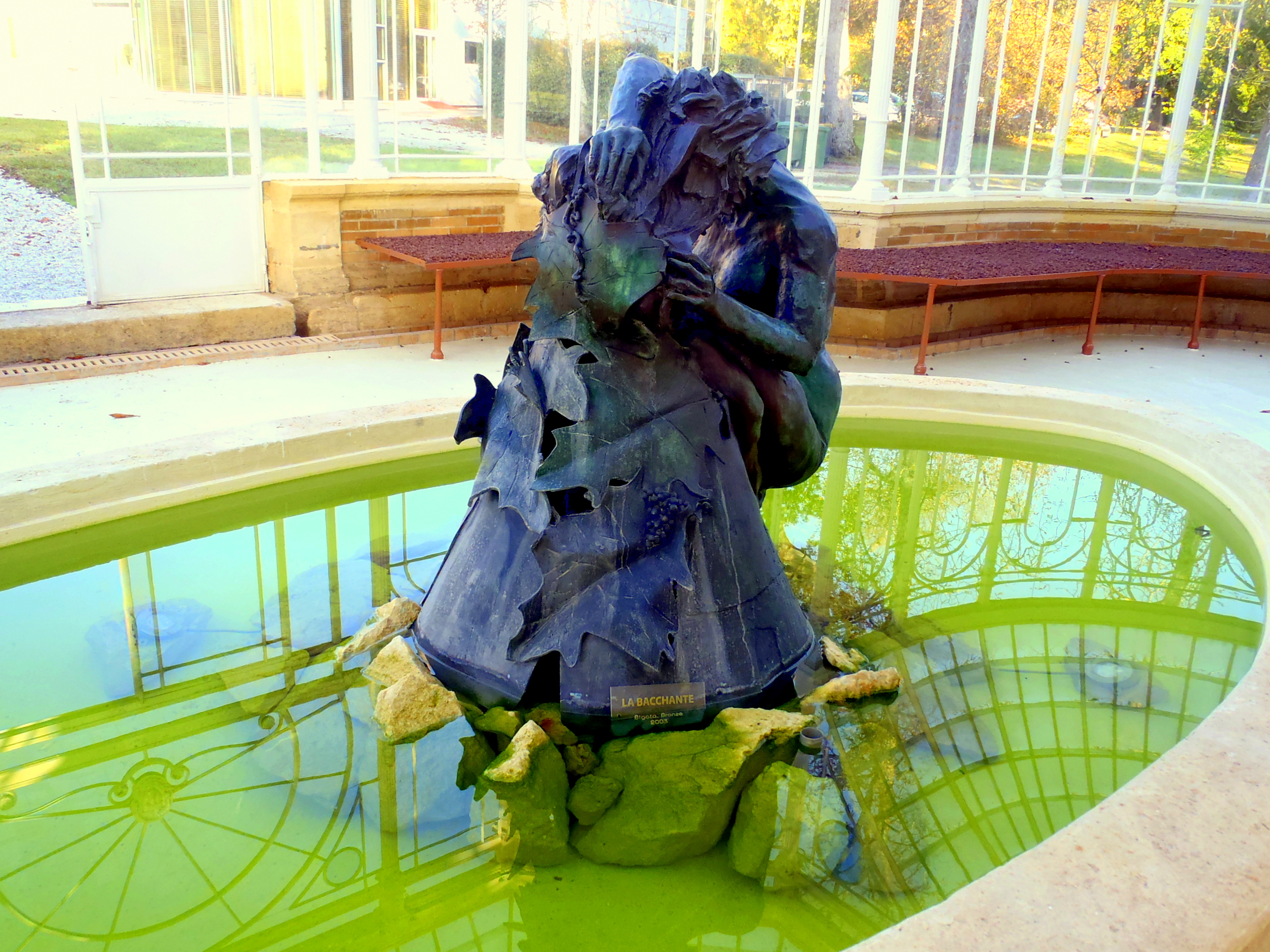 Escale bigata Serre Parc de Laurenzanne - Gradignan - 3170